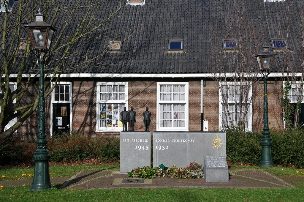 'Een afscheid zonder thuiskomst'. 1945-1952. Ter herinnering aan 26 inwoners van Leiden. die als Nederlands militair in Nederlands Oost Indië om het leven kwamen. Kunstenaar Gerard Brouwer (Leiden 1951).